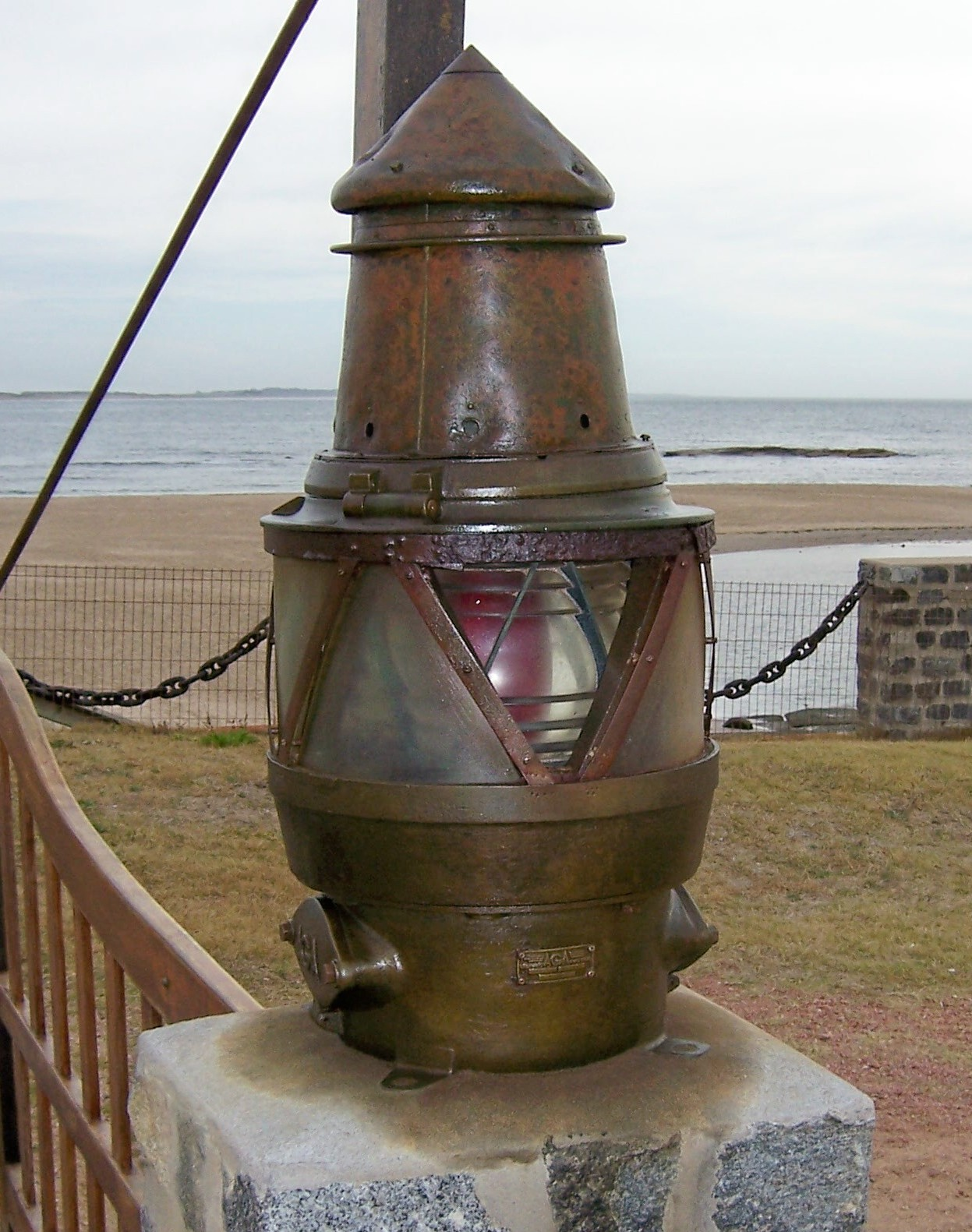 Antigua linterna como ornamento del portón de acceso al faro de José Ignacio, Uruguay.